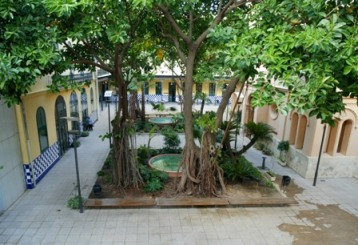 Pati Centre Cultural la Beneficència — Land of Valencia.